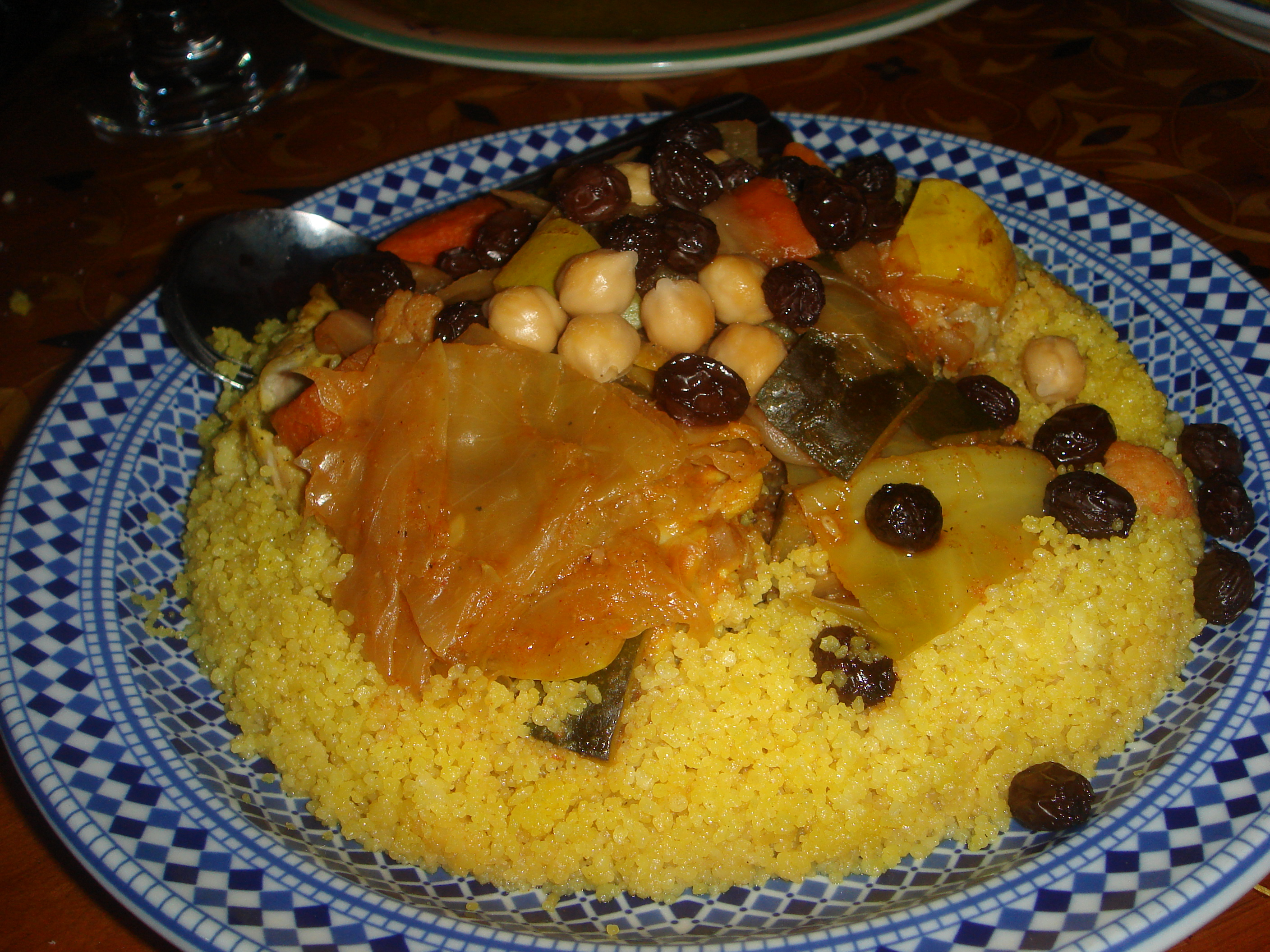 Moroccan lamb